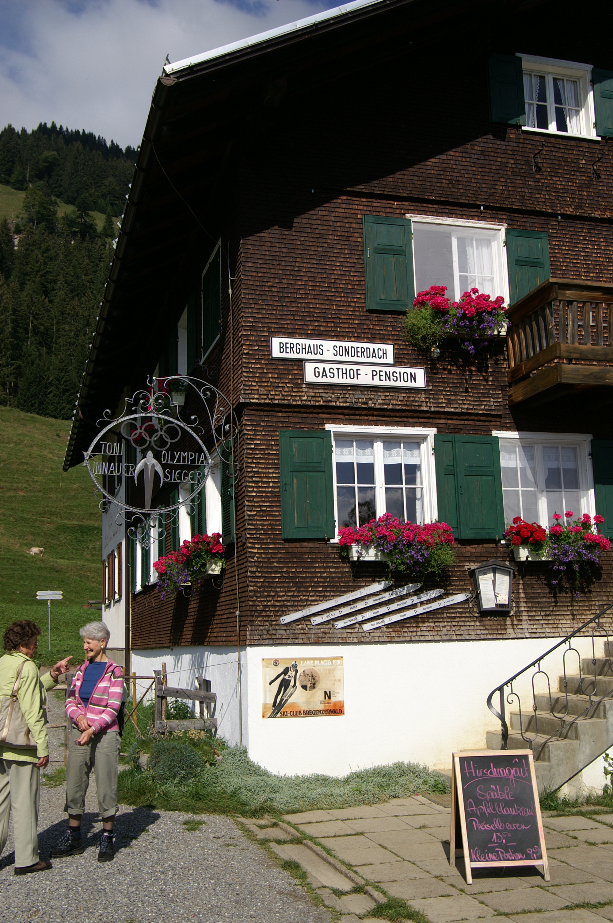 das Elternhaus von Toni Innauer (das Berghaus Sonderdach in Bezau) geführt von der Schwester Berghild Innauer